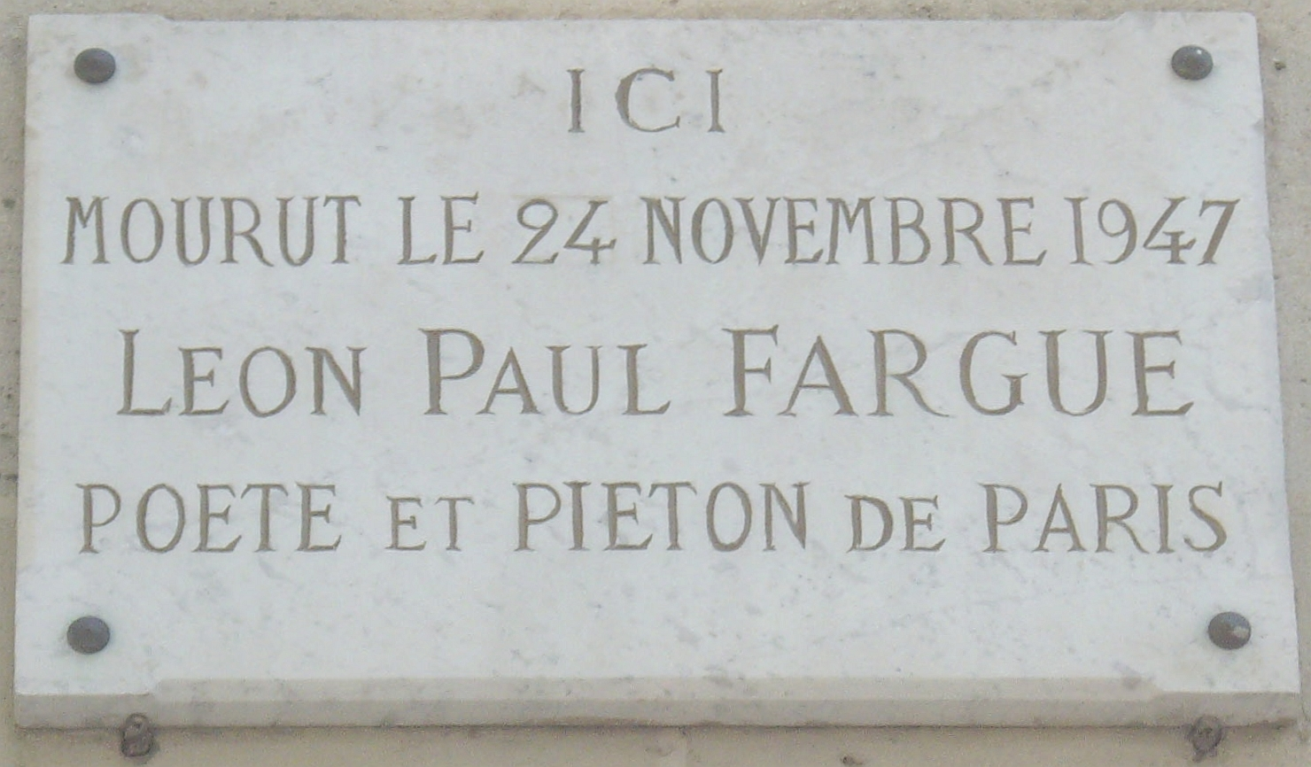 Plaque commémorative, 1 place Léon-Paul-Fargue, Paris 6e. « Ici mourut le 24 novembre 1947 Léon-Paul Fargue, poète et piéton de Paris. »